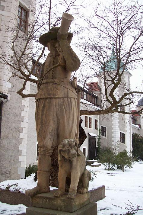 Kopie Sandsteinjäger am Jägerhof in Dresden